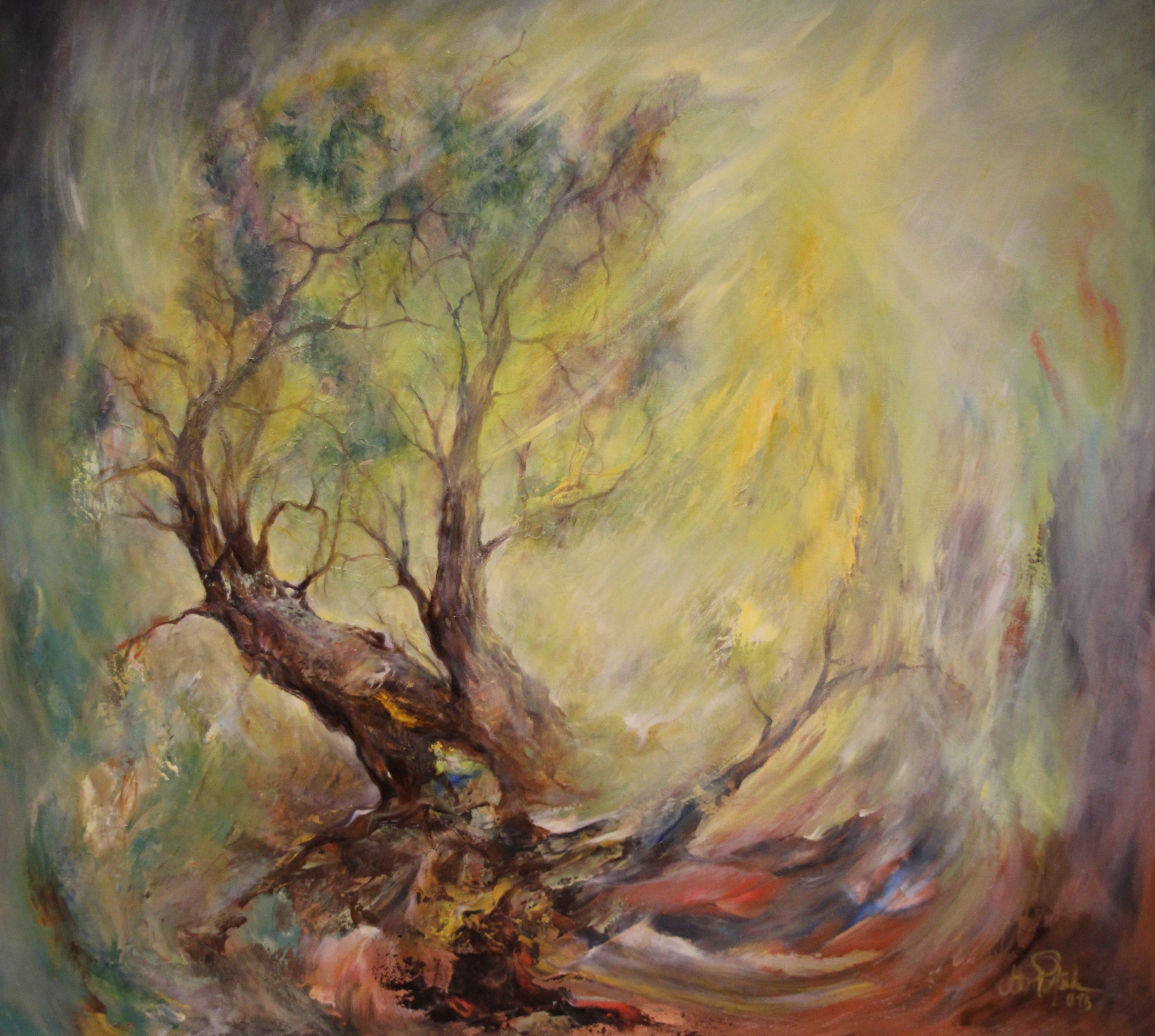 Ölgemälde auf Leinen, gemalt von Otto Potsch im Jahre 2009.